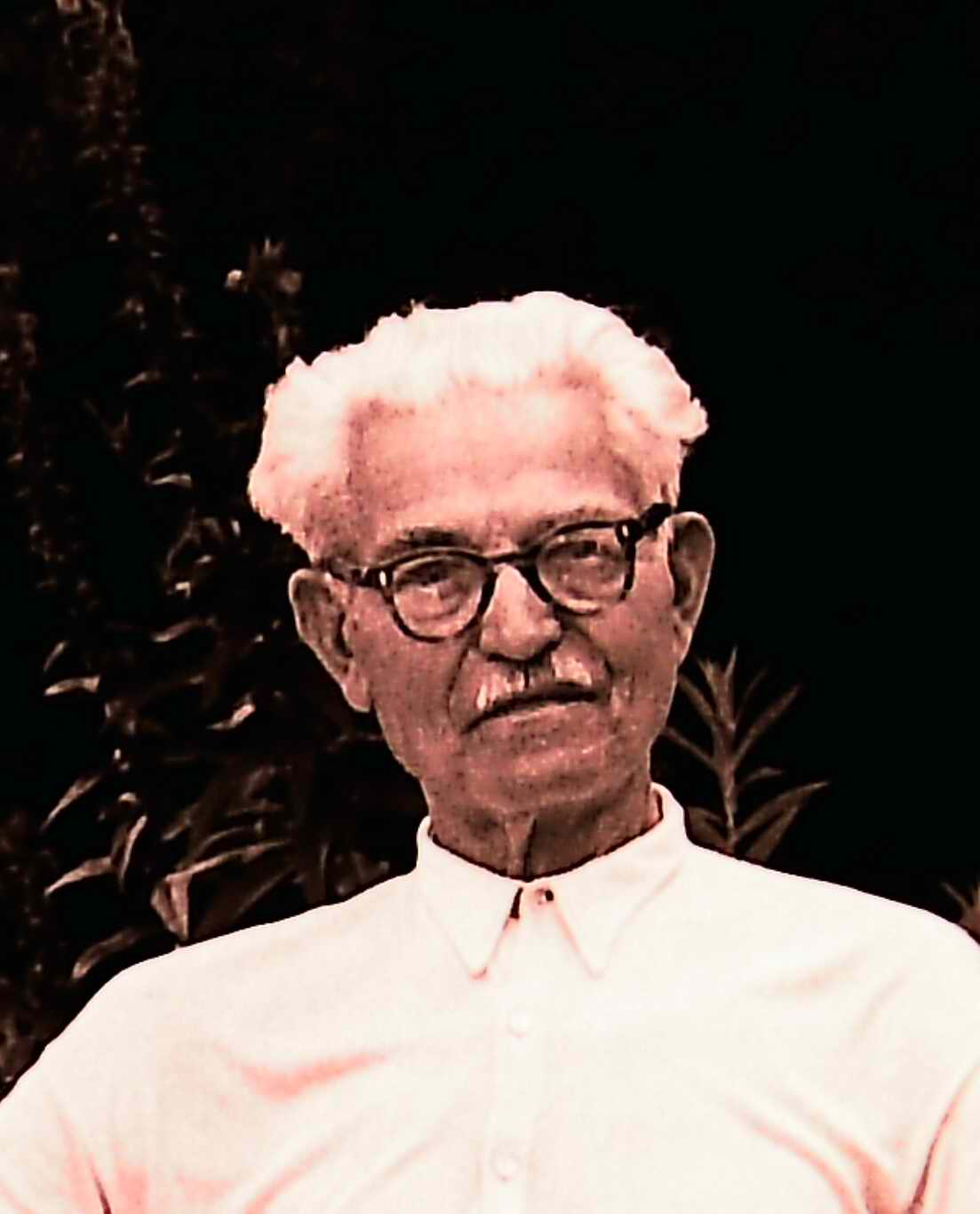 Antonín Dědourek (2. května 1882, – 11. ledna 1964), český knihař a nakladatel.